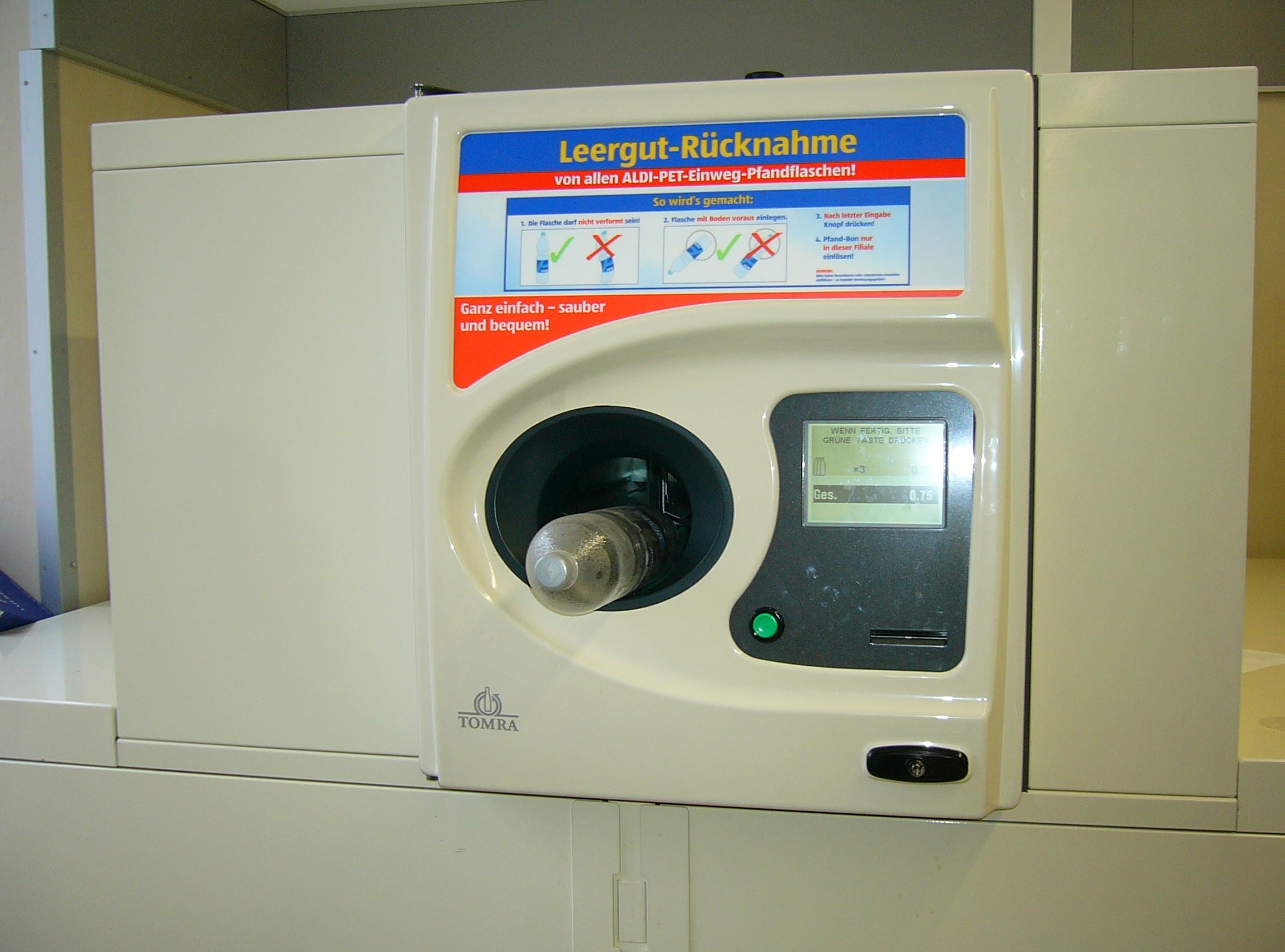 Pfandrückgabeautomat bei Aldi Süd (Hersteller: Tomra), Standort: München